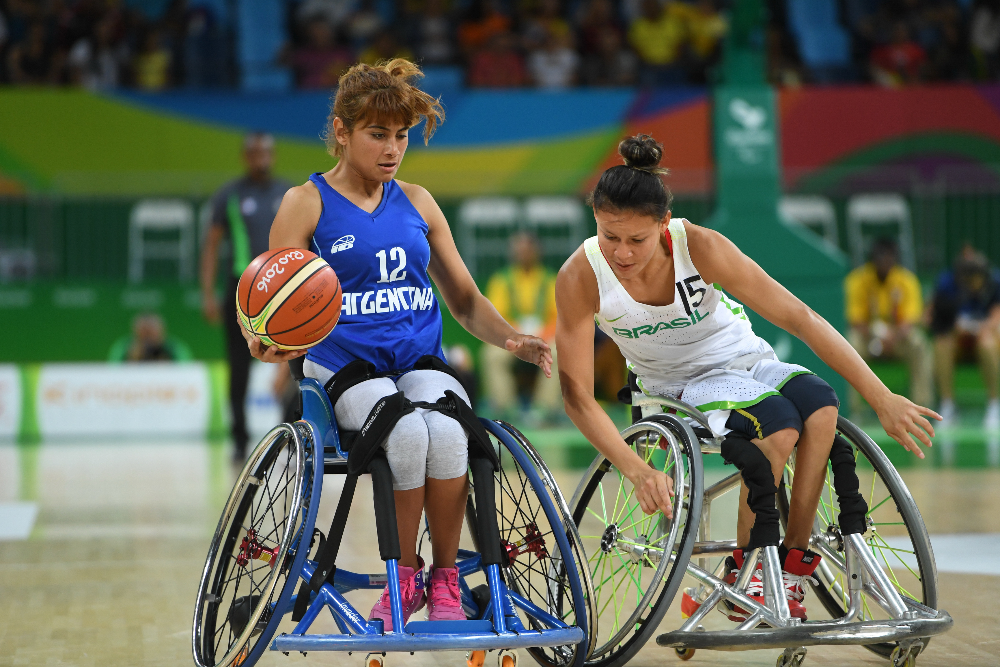 Rio de Janeiro - O time de basquete paralímpico do Brasil inicia jogando contra a Argentina na Rio 2016 (Tomaz Silva/Agência Brasil)